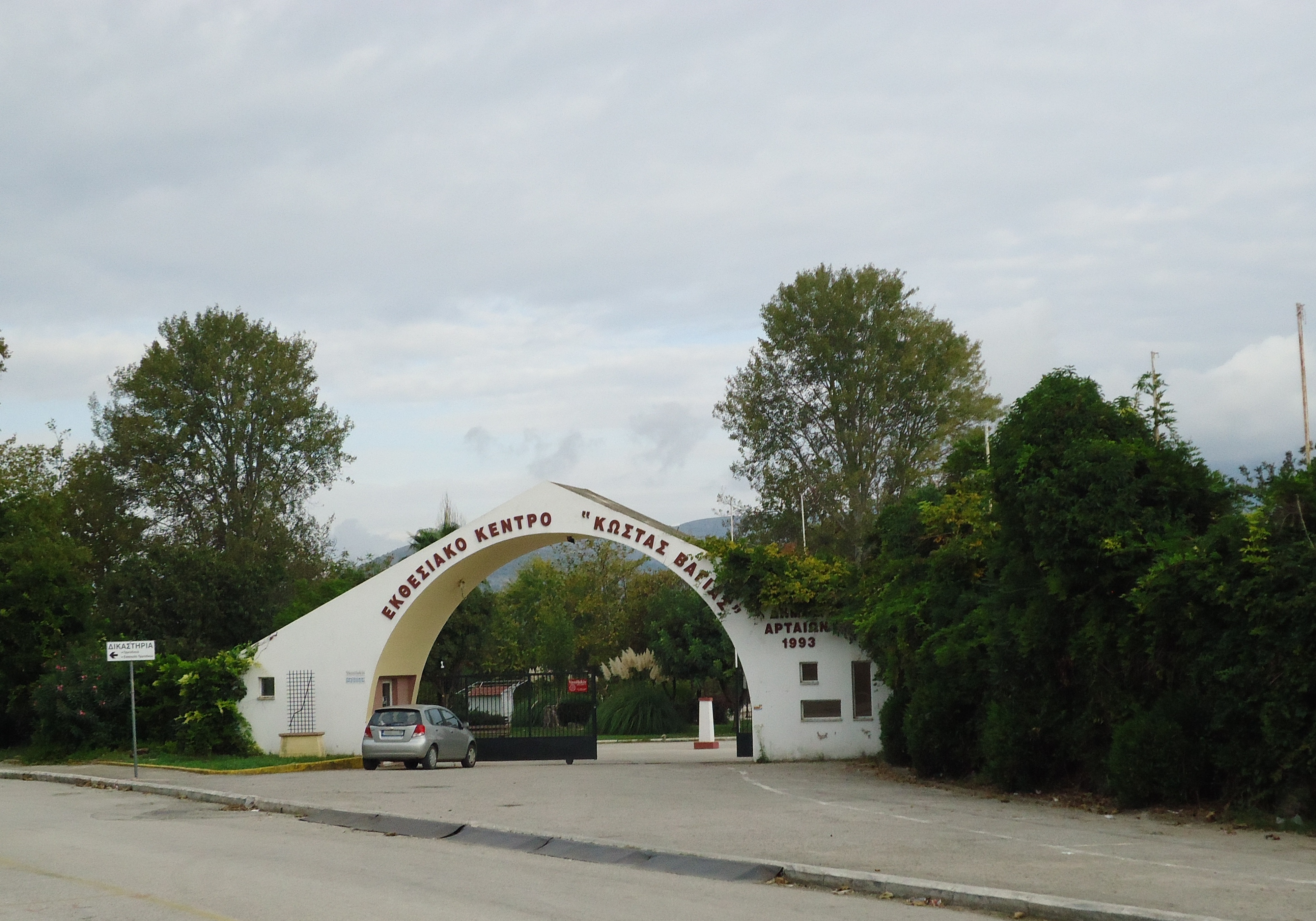 Εκθεσιακό Κέντρο Άρτας, Κώστας Βάγιας.